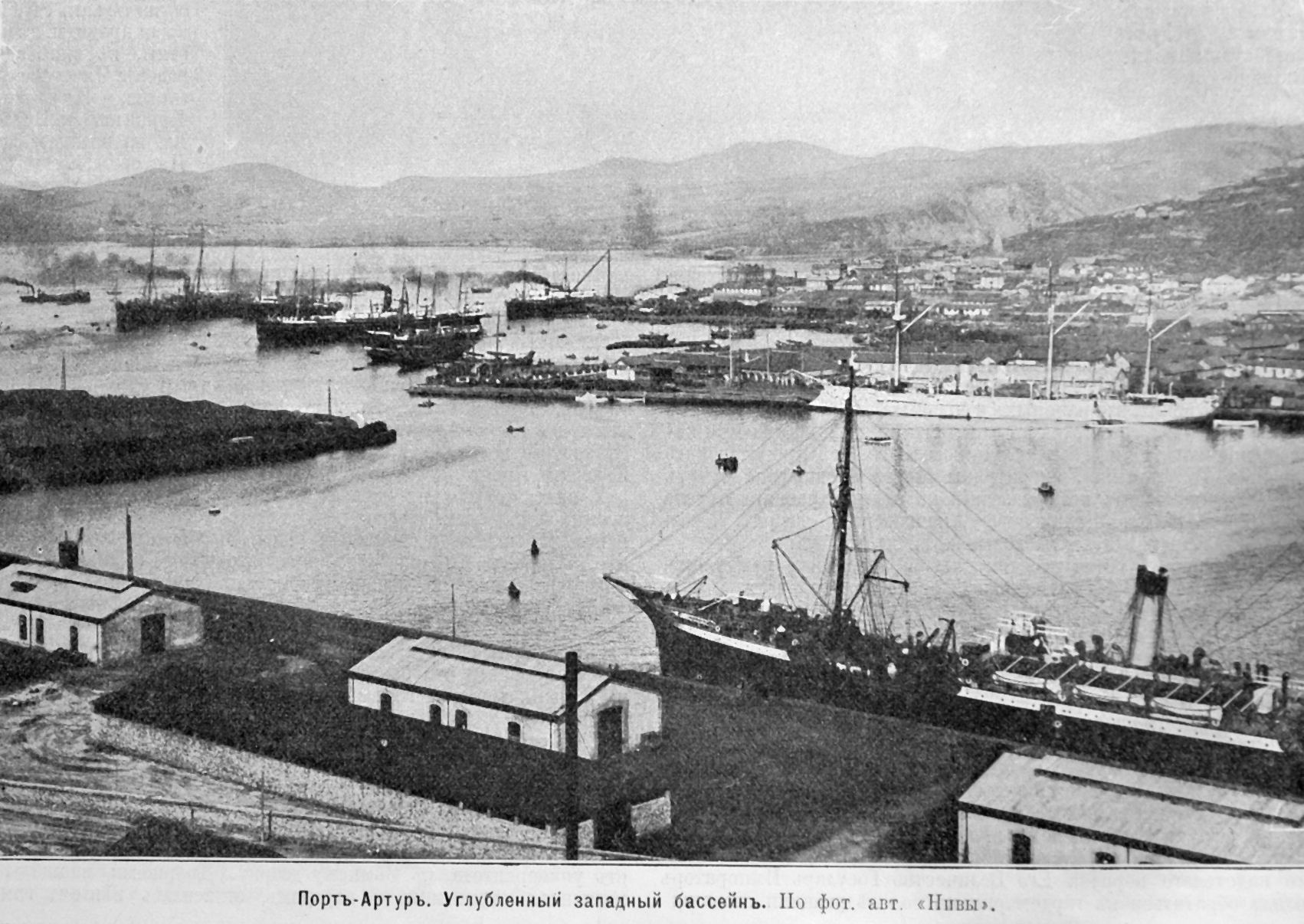 Порт Артур. Углубленный западный бассейн.